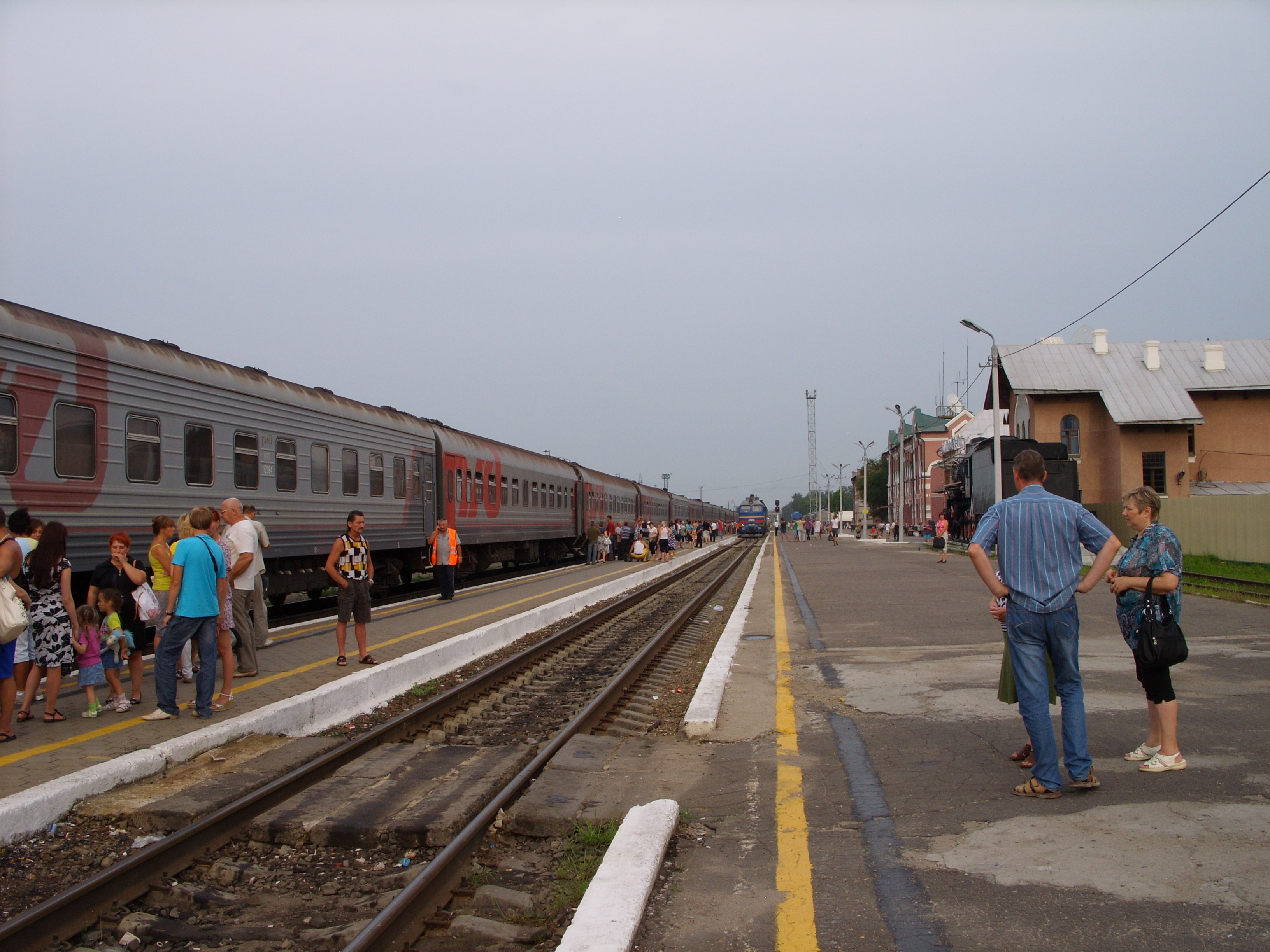 снимки августа 2011 г.